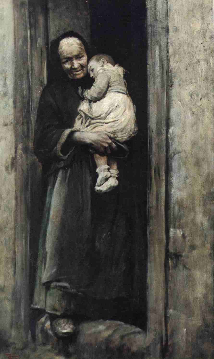 Stařena s dítětem